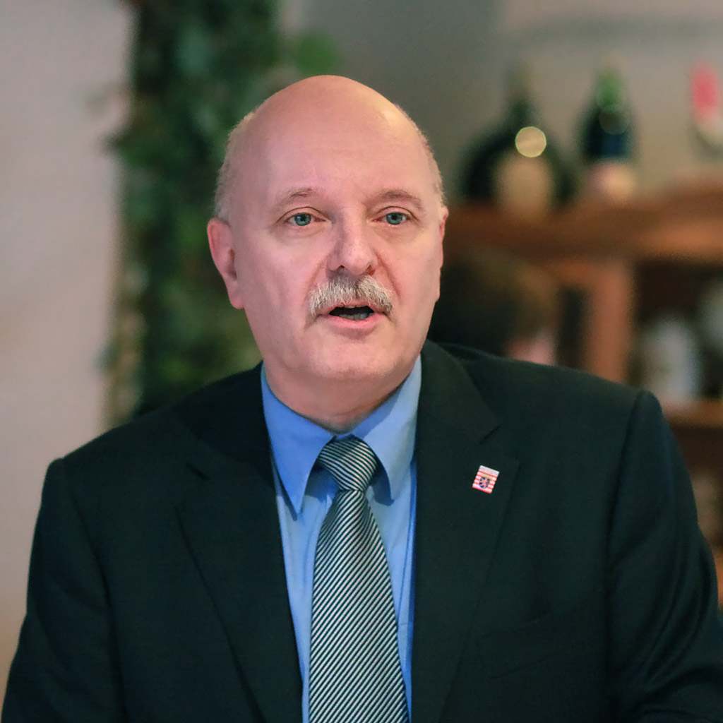 Dirk Metz, Staatssekretär in der Hessischen Staatskanzlei und Sprecher der Hessischen Landesregierung. Am Abend des 7. Oktober 2009 in Mörfelden-Walldorf, Ortsteil Walldorf, anlässlich der Verleihung des Bundesverdienstkreuzes an Lutz Scheibe.